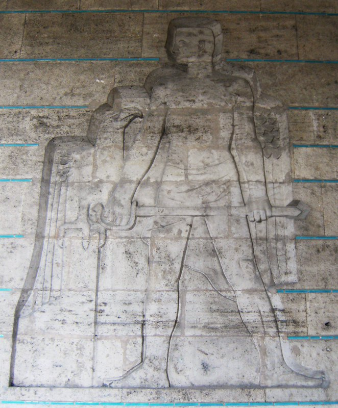 Anıtkabir rölyefi